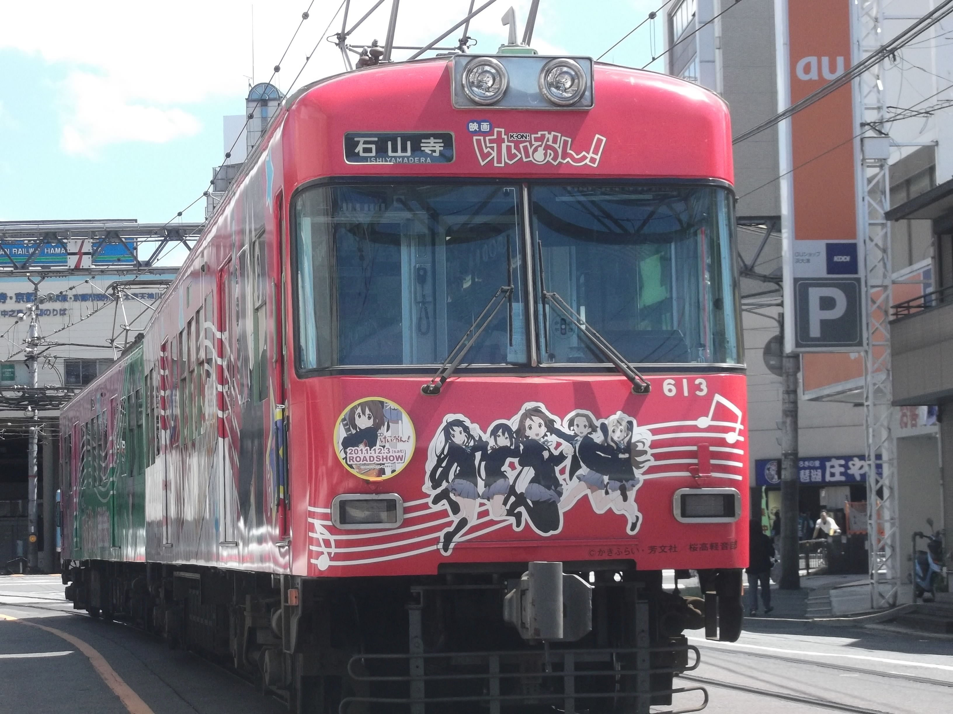 浜大津駅に進入する京阪電気鉄道600形電車(3代)『映画けいおん!』ラッピング編成（2011年9月5日）